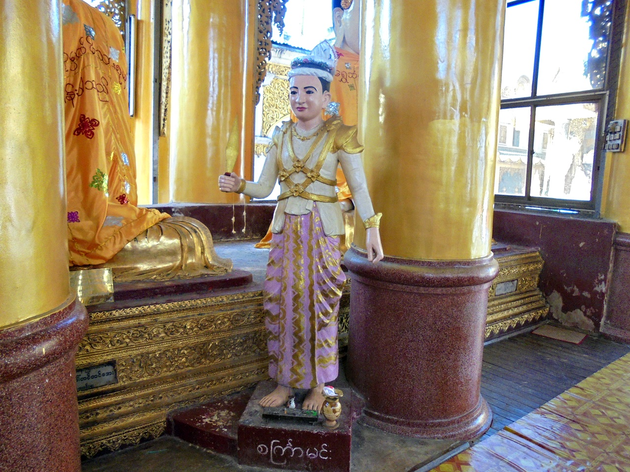 မြန်မာဘာသာ: စကြာမင်းသား